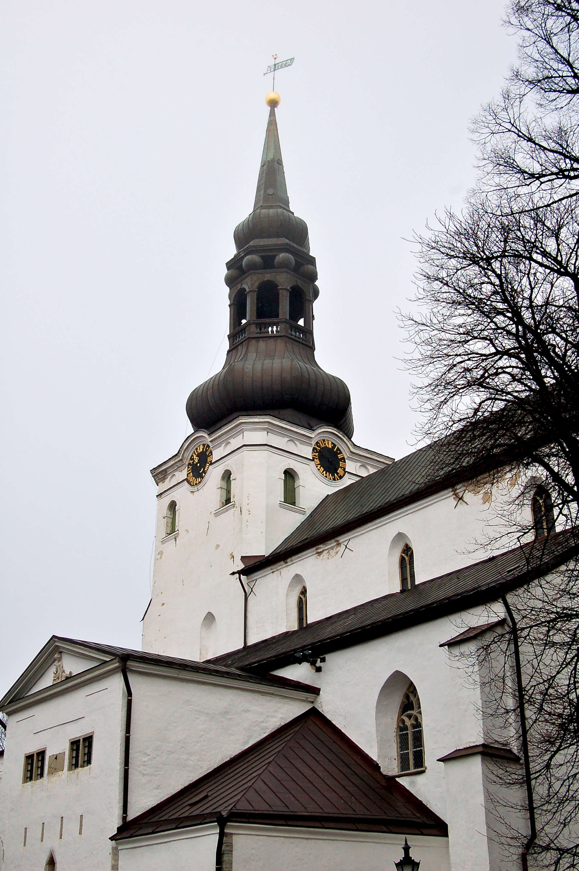 Cattedrale di Santa Maria sulla collina di Toompea a Tallinn, Estonia